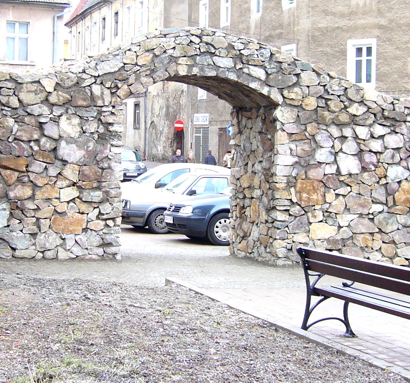 Kamienna Góra, mury miejskie, XV